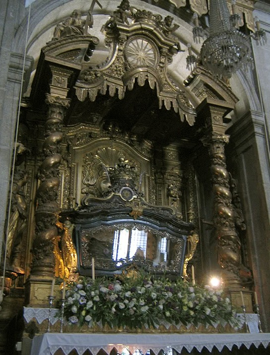 Altar y sepulcro de la beata Mafalda de Portugal, en el Monasterio de Arouca.